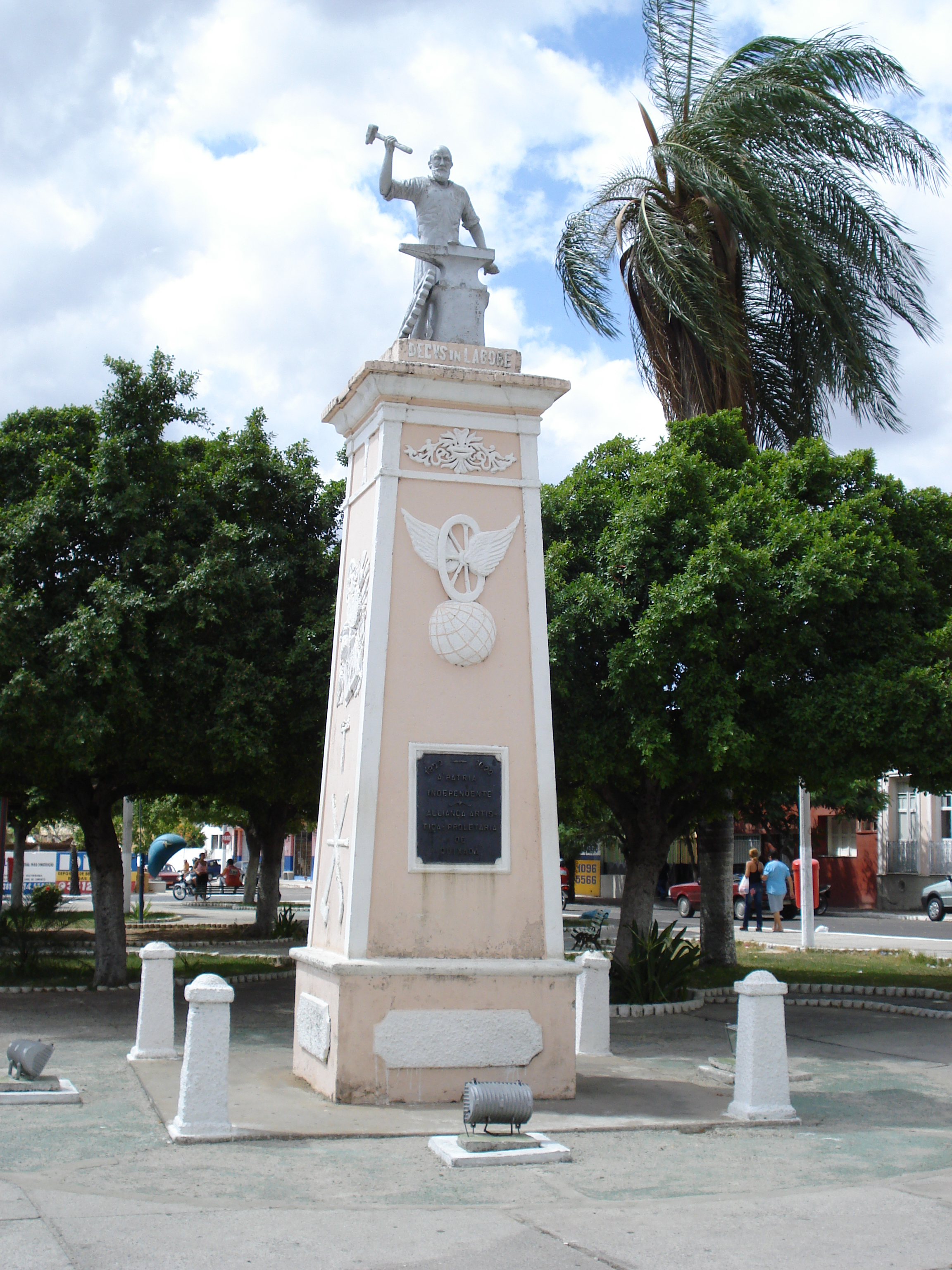 Monumento "O Trabalhador", de Jacinto de Sousa